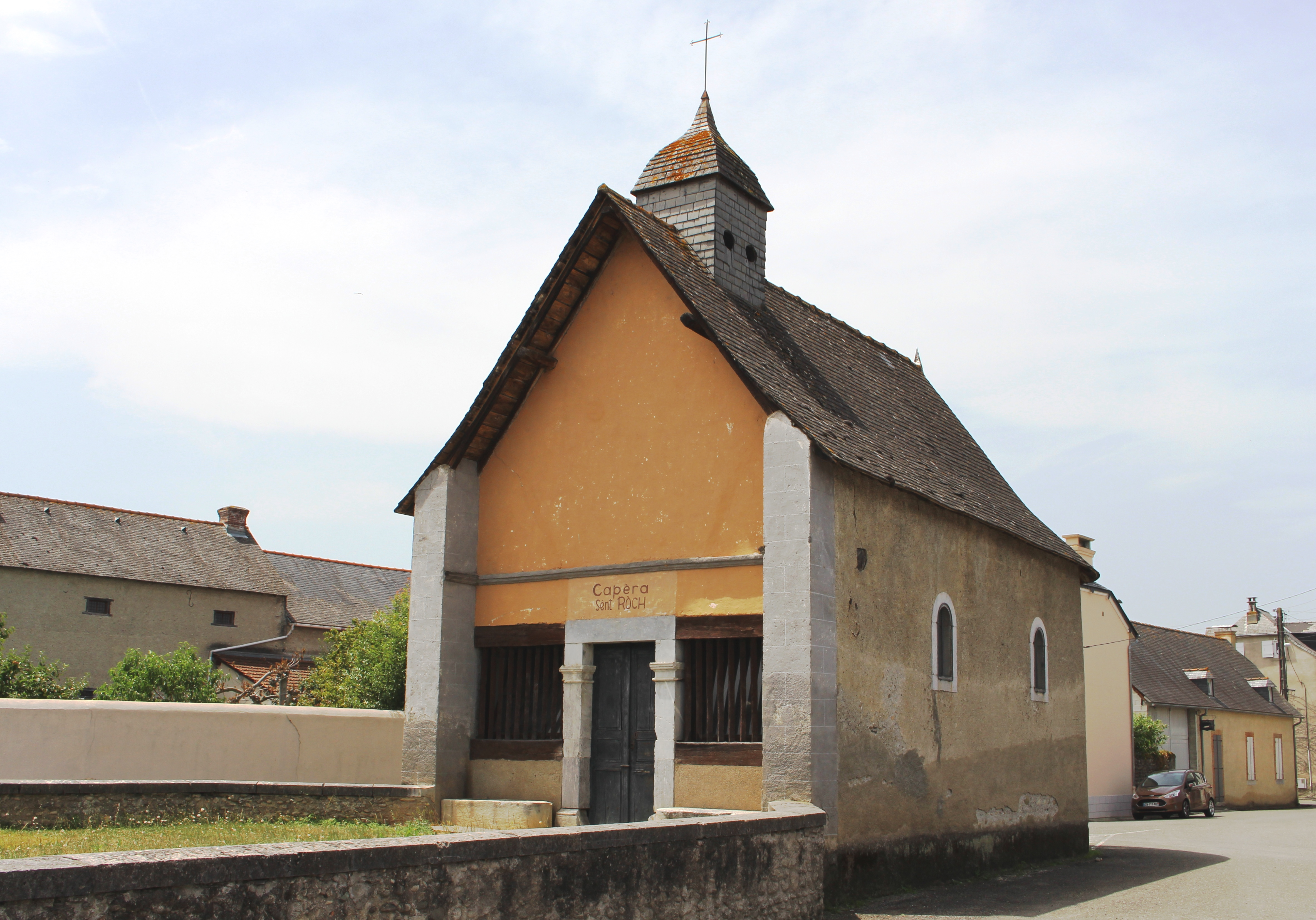 Chapelle Saint-Roch d'Ibos (Hautes-Pyrénées)